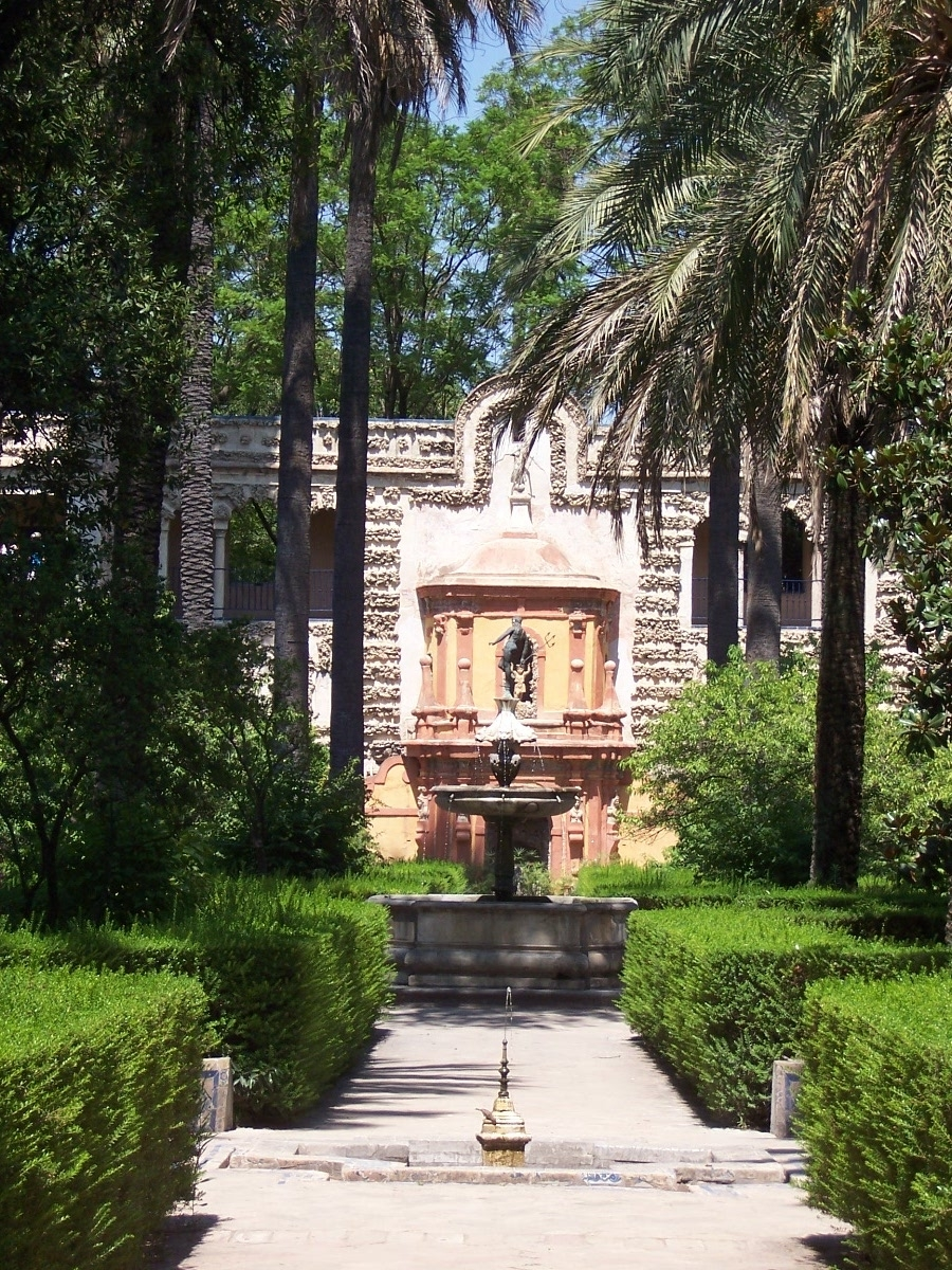 Alcázar de Sevilla camera: Kodak DX7440 Source: *Daniel Csorfoly